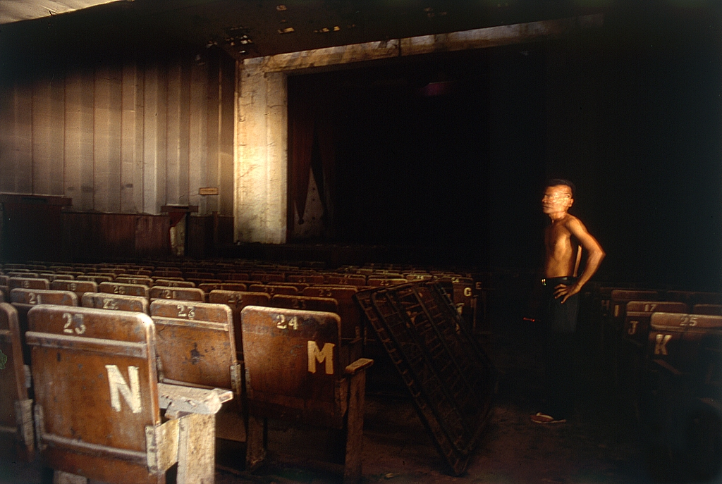 cinema le rex Phnom Penh, Cambodia